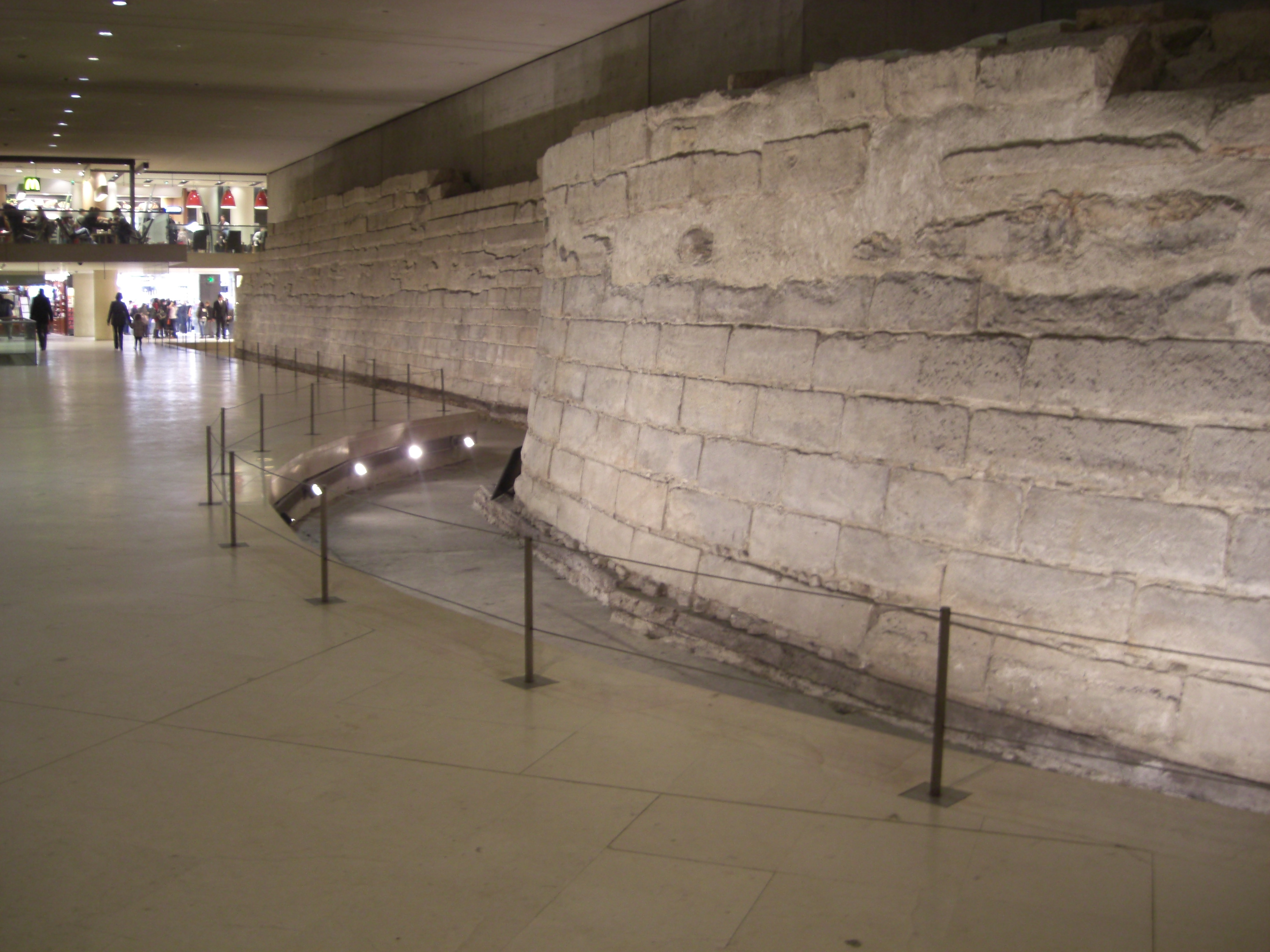 Les Douves du Louvre dans la partie commerciale du Musée.